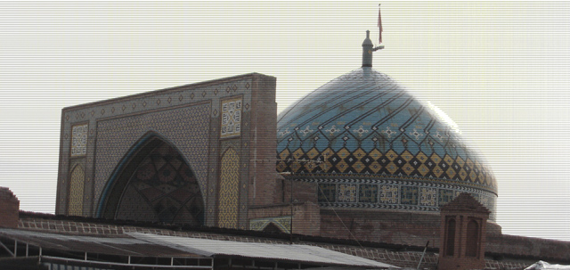 Al-Nabi mosque, Qazvin, Iran